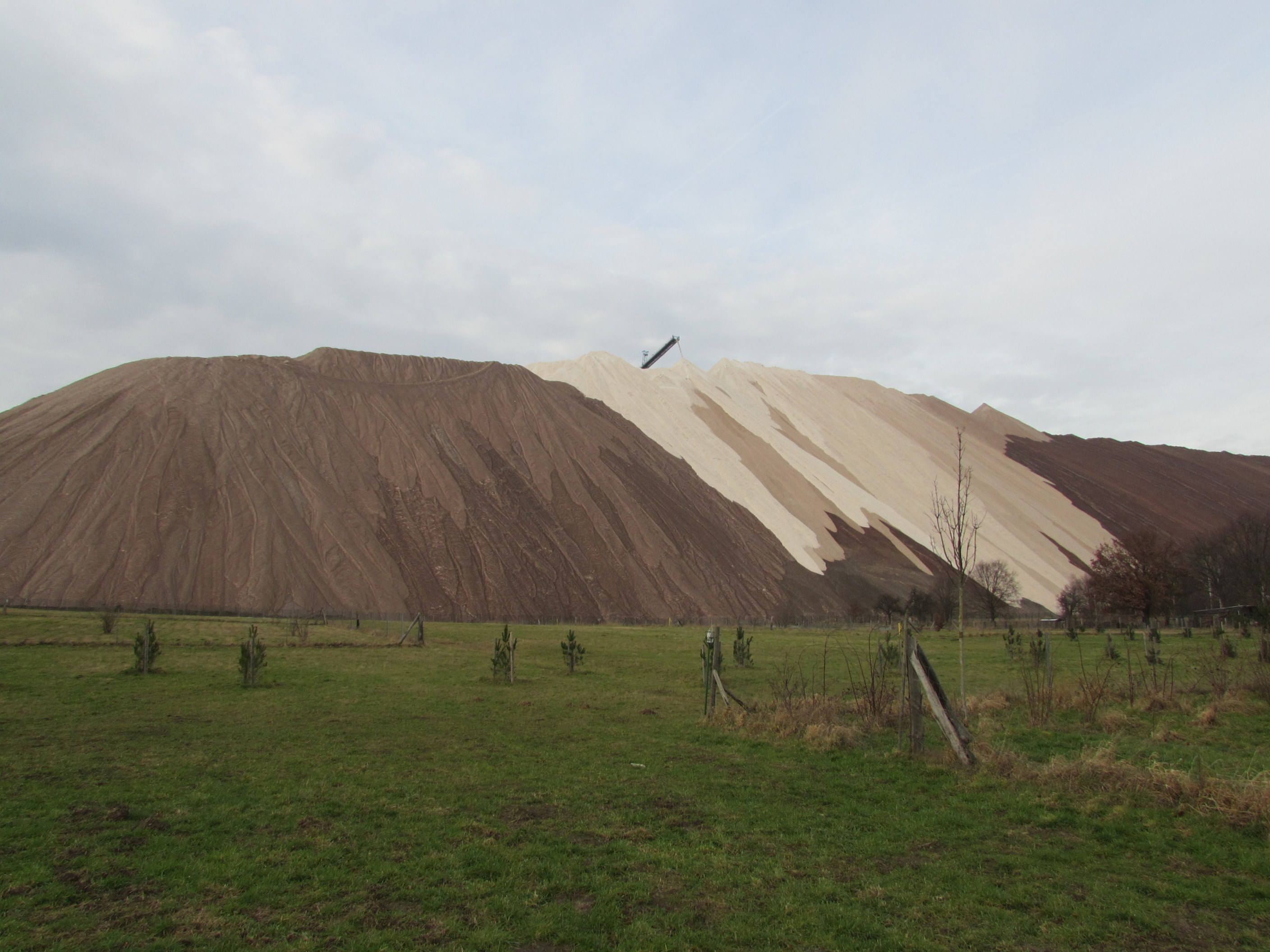 Abraumhalde des Kaliwerks Zielitz („Kalimandscharo“)